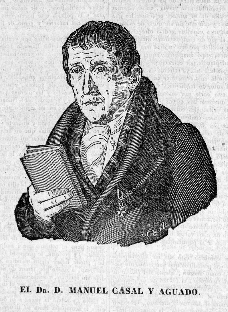 Manuel Casal y Aguado (1751-1837)